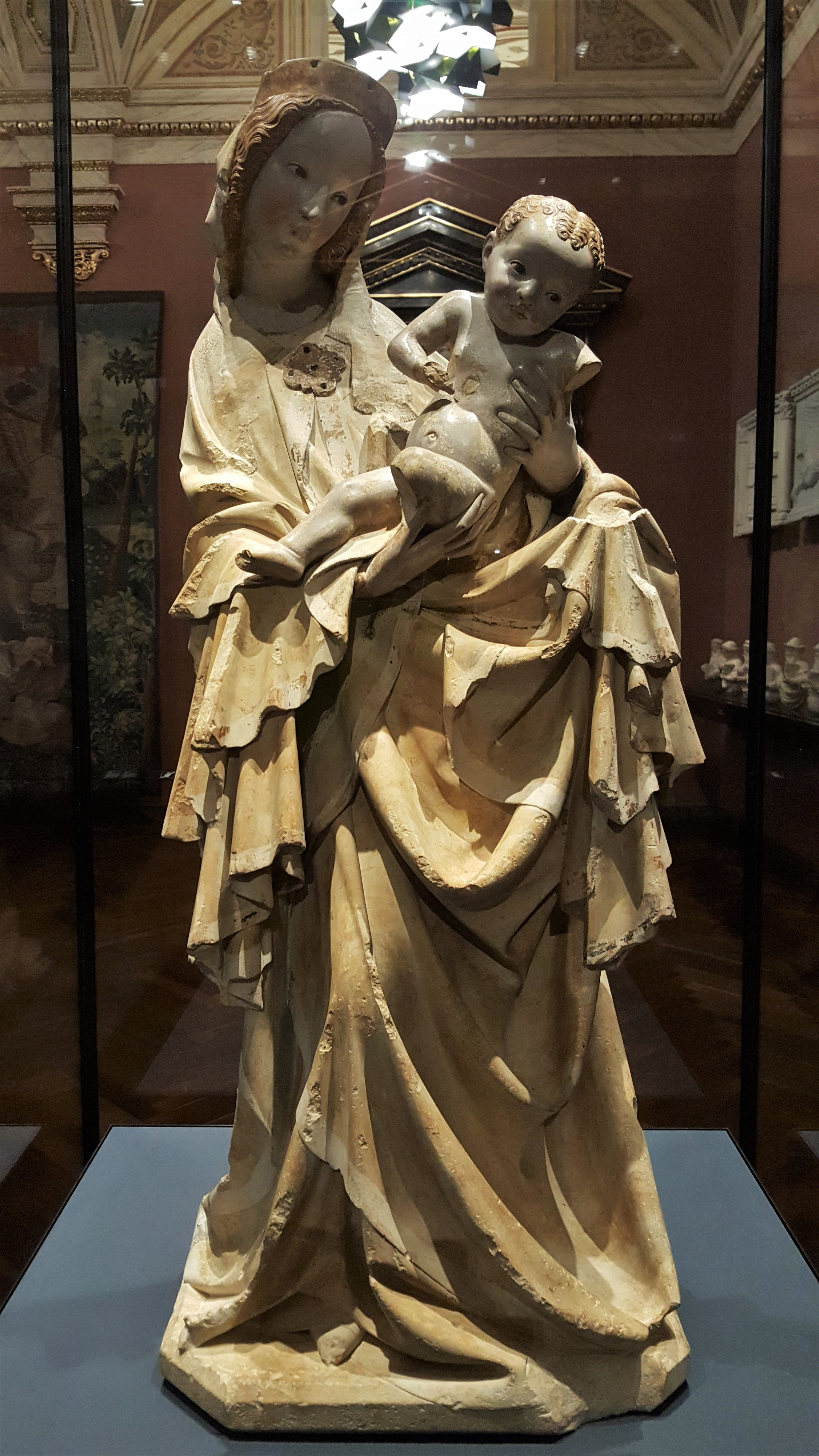 Krumlovská madona, (kol. 1390/1400), Praha, jemnozrnný vápenec - Kunsthistorisches Museum, Vídeň